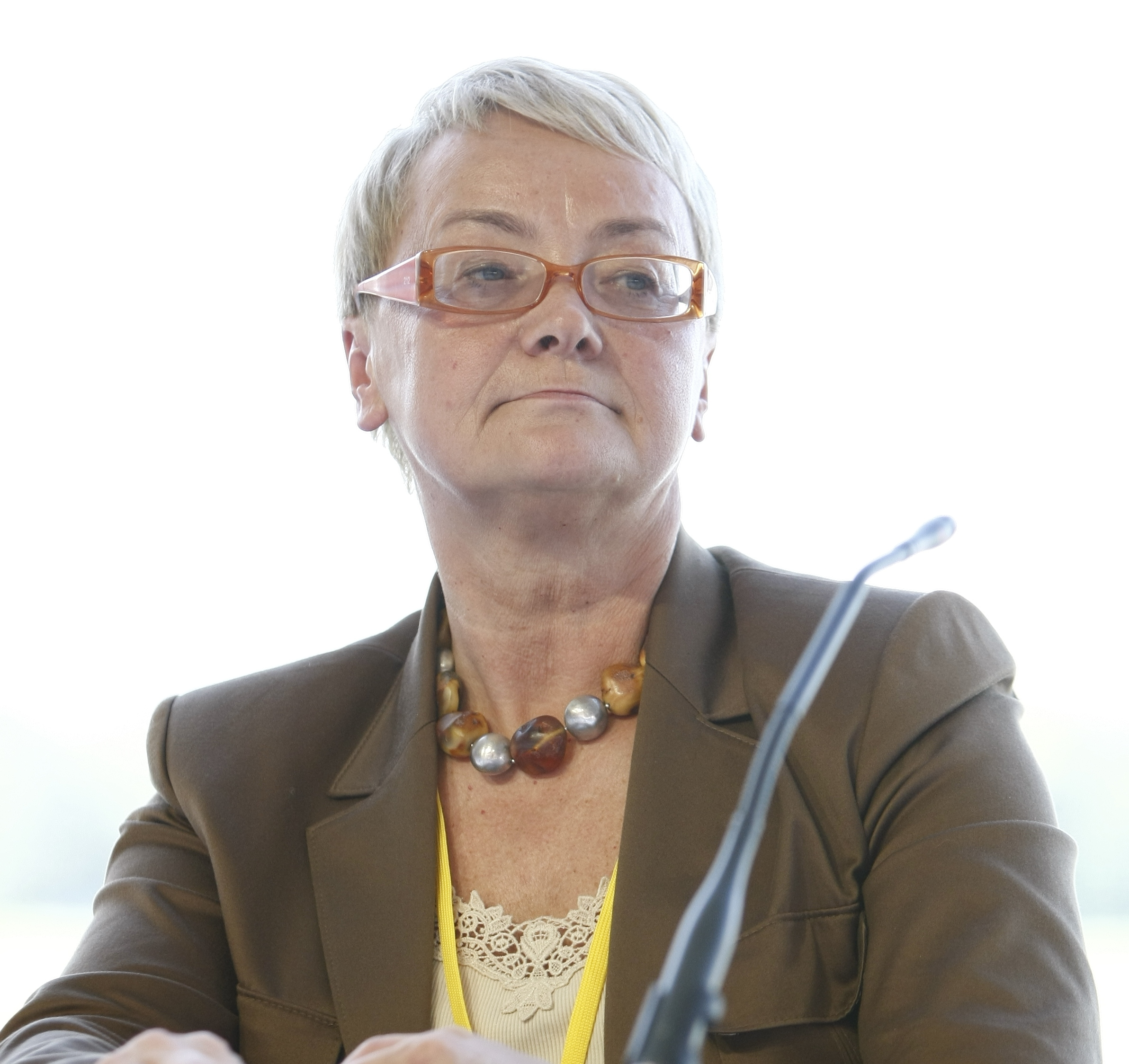 Henryka Bochniarz, Polish politician